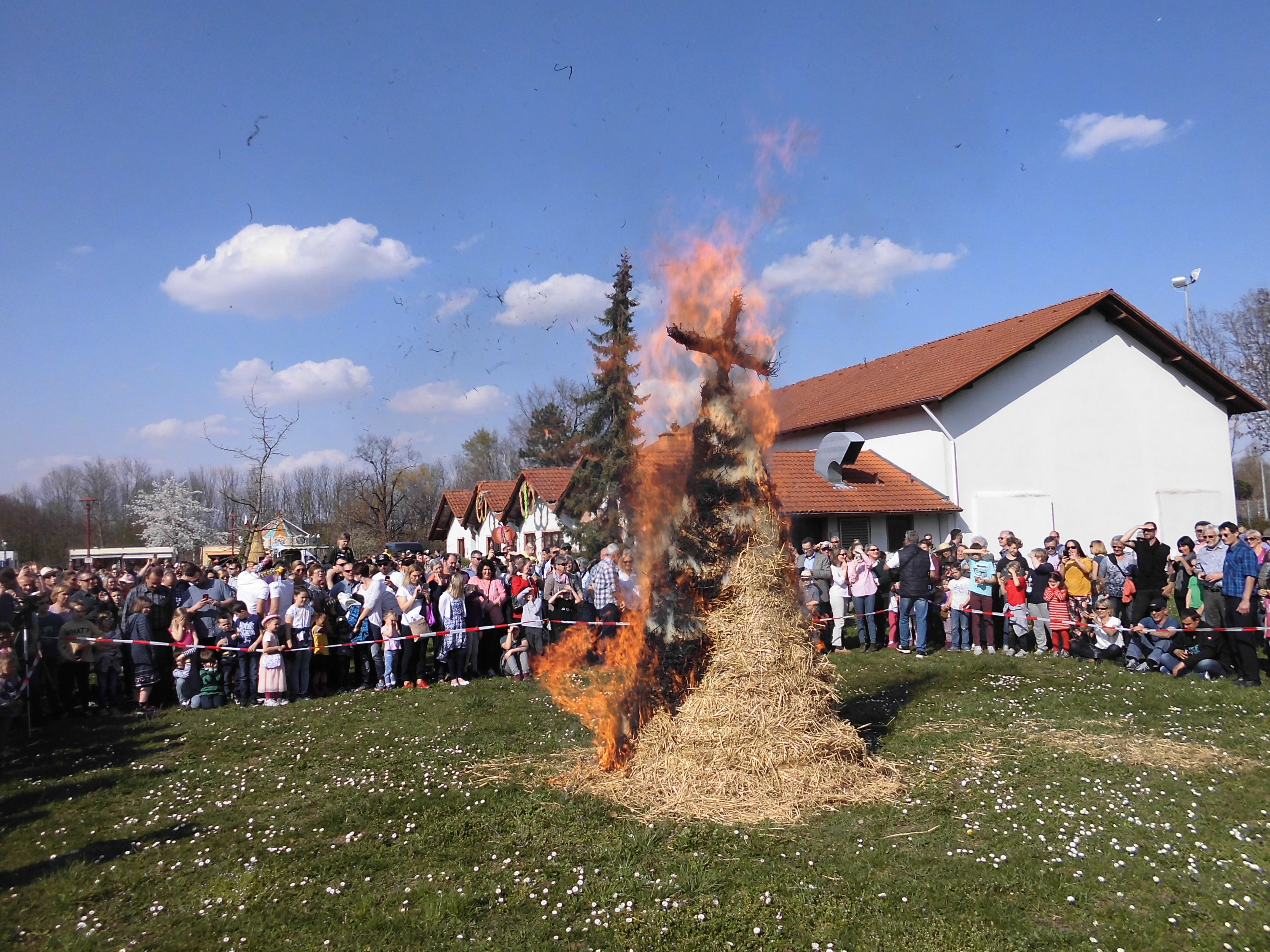 Zum Schluss des Hansel-Fingerhut-Festes in Forst wird symbolisch der Winter verbrannt